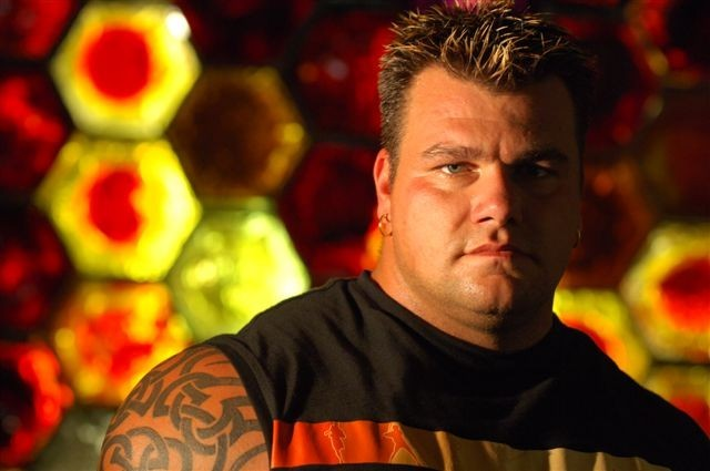 Jarno Hams